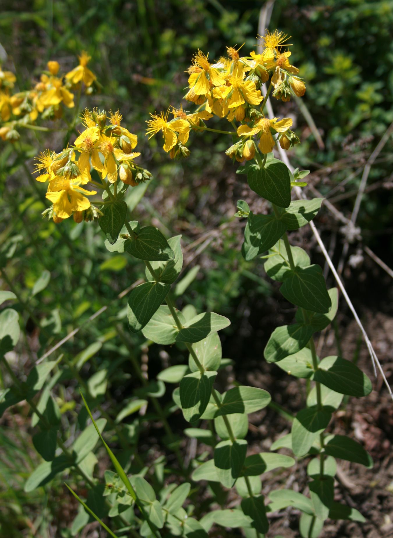 Hypericum montbretii, Johanniskrautgewächse (Hypericaceae) - Türkei/Türkiye/Turkey: Prov. Bolu/Bolu ili, Bolu Dağları, Yedigöller-Nationalpark/Yedigöller Millî Parkı, Kapankaya Tepesi, 1180-1250 m